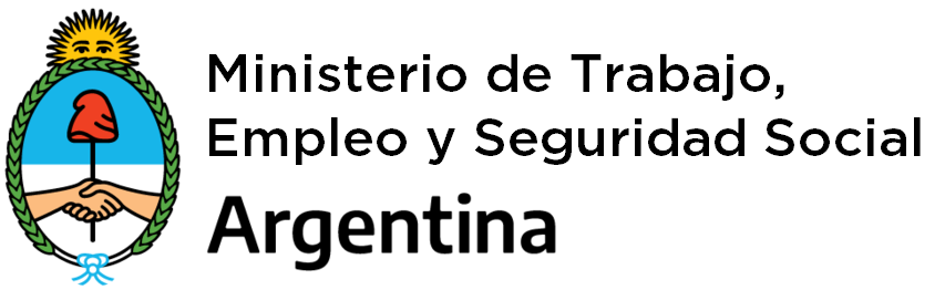 Ministerio de Trabajo